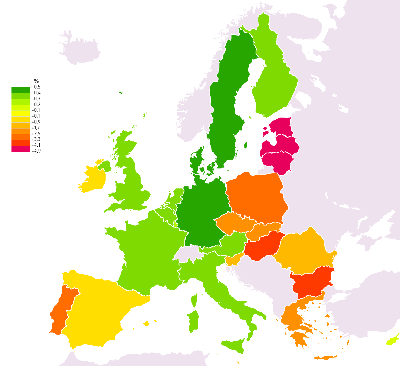 разница между взносом в союзный бюджет и выплатами из него источник